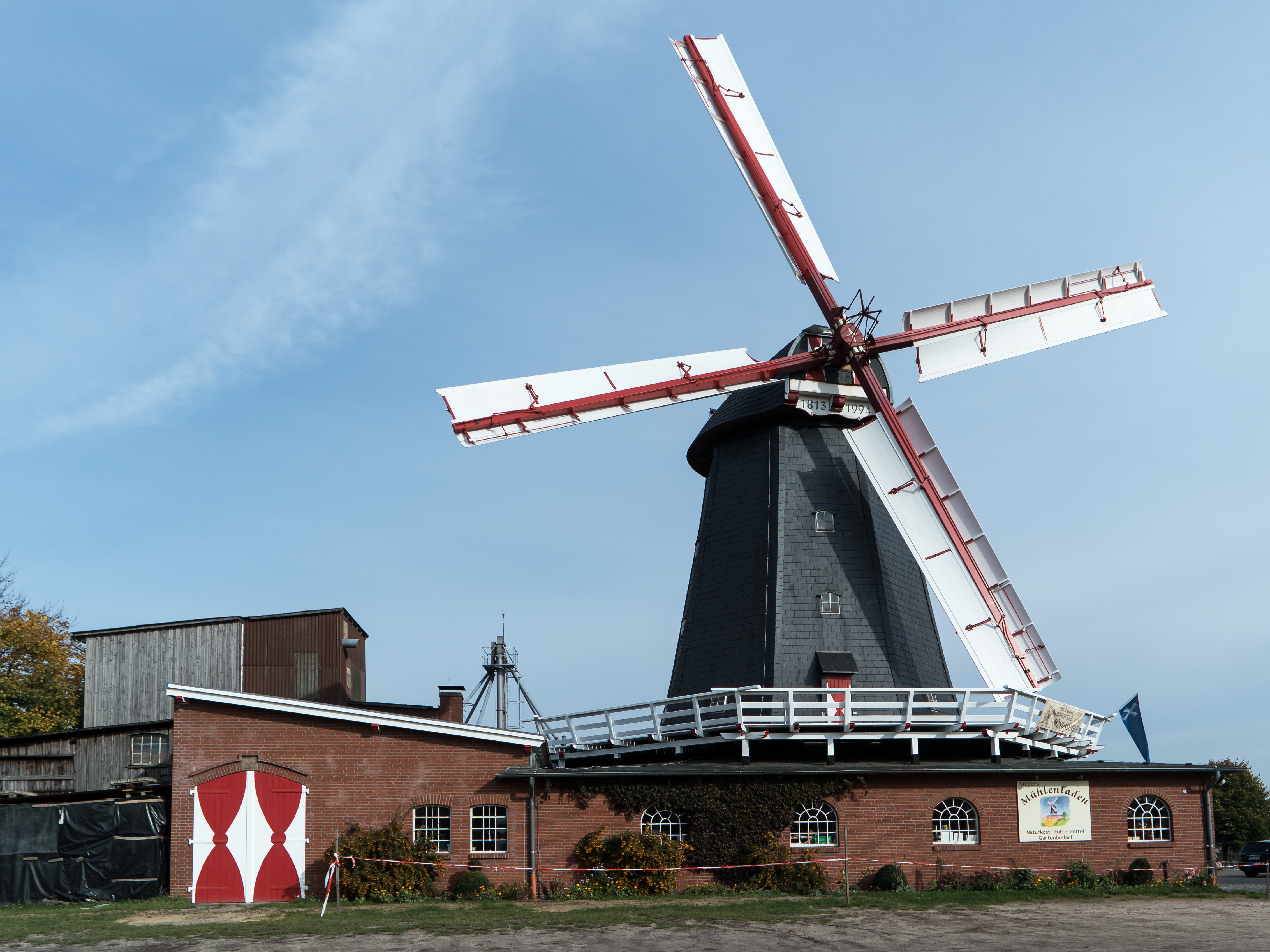 Bardowicker Windmühle